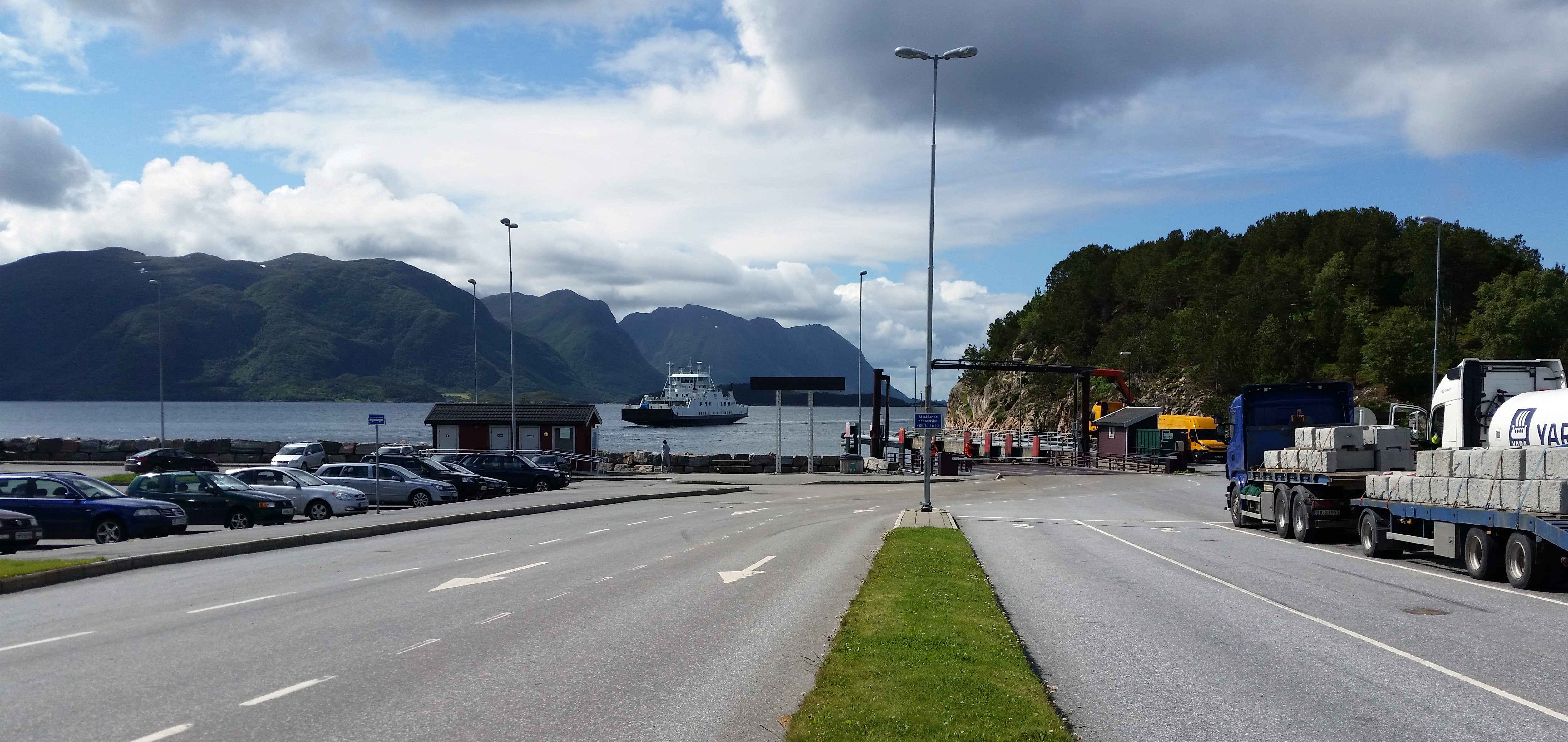 Hollingsholmen Fergeleie, Aukra, Møre og Romsdal